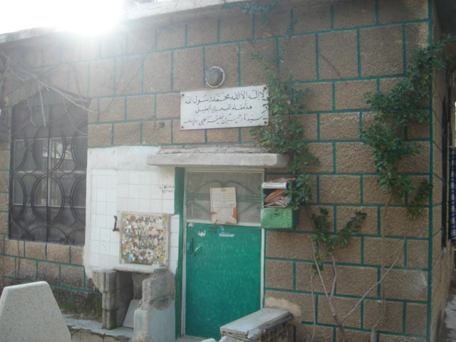 مقام الصحابي الجليل دحيه الكلبي التي تنتسب له قبيلة الشرارات